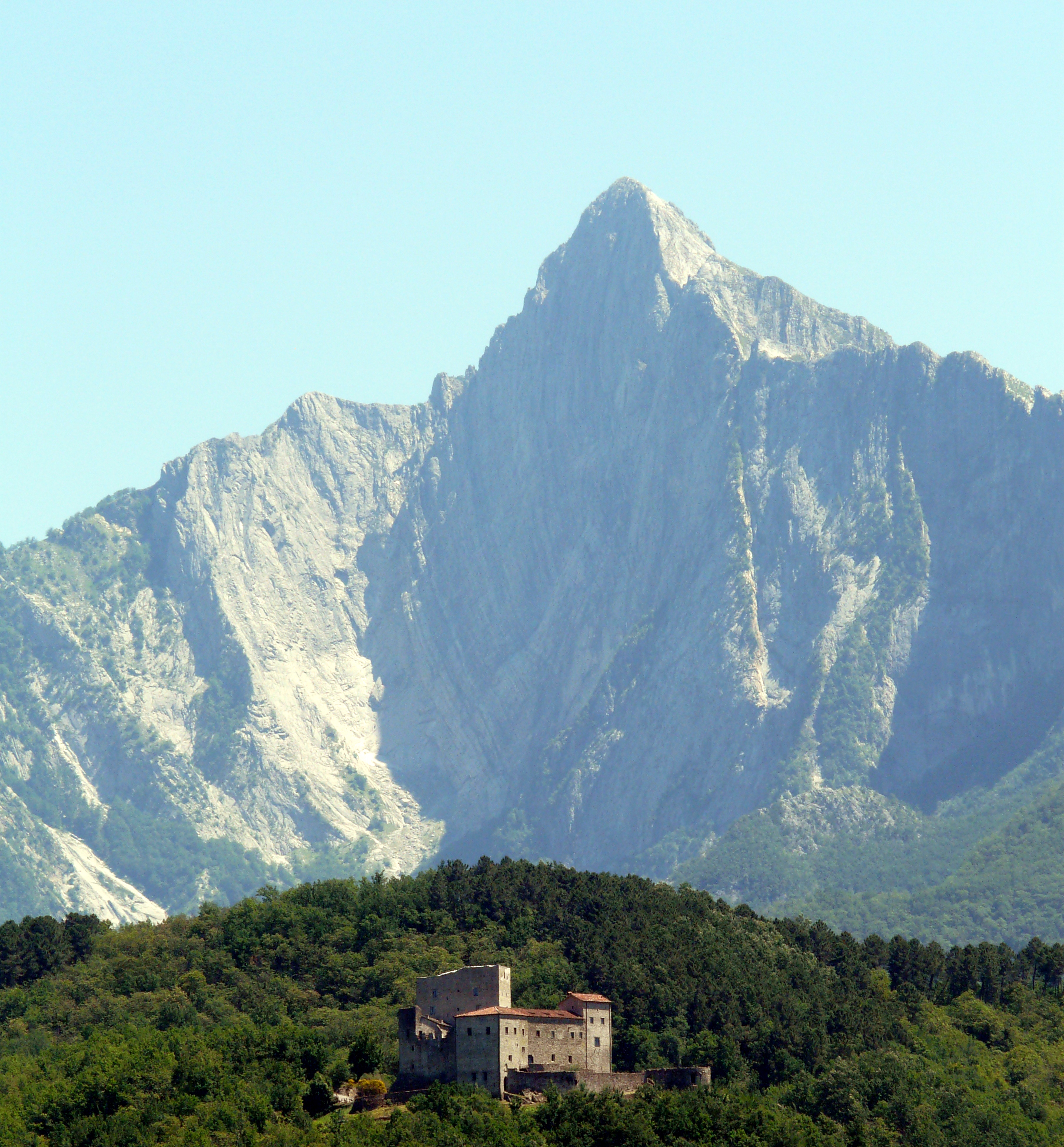 Il castel dell'Aquila, Gragnola, Fivizzano, Toscana, Italia